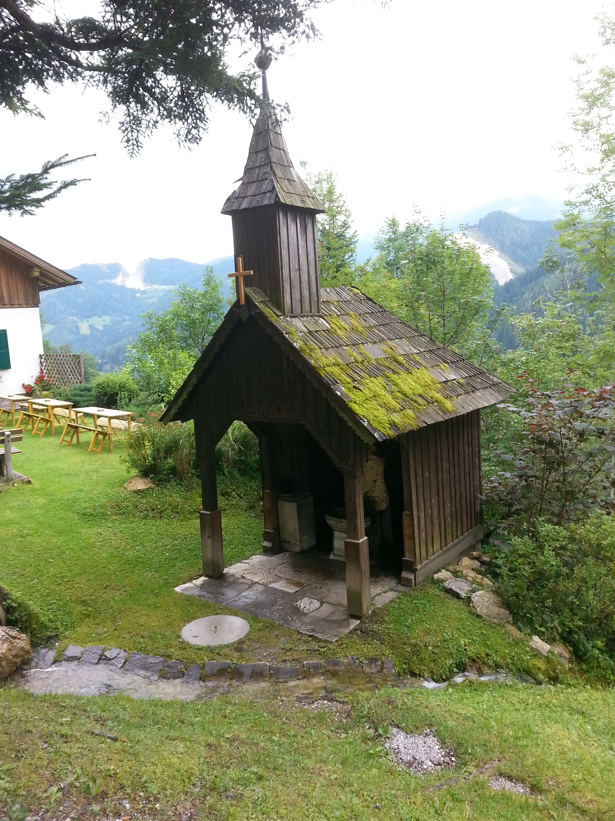 Kath. Filialkirche St. Radegund am heiligen Wasser